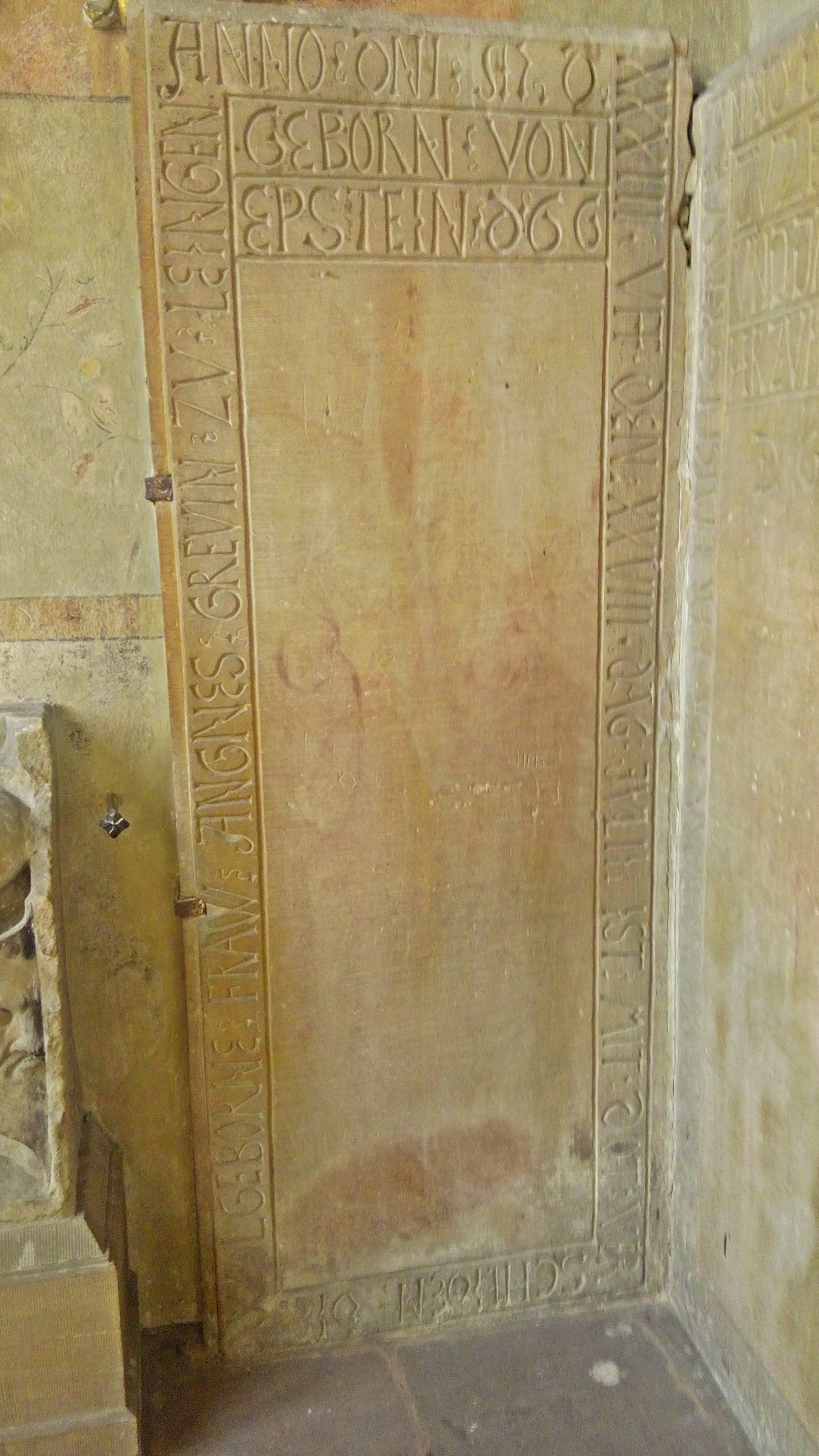 Grabplatte Agnes von Eppstein verheiratete Leiningen (+ 1533), Schlosskirche Bad Dürkheim